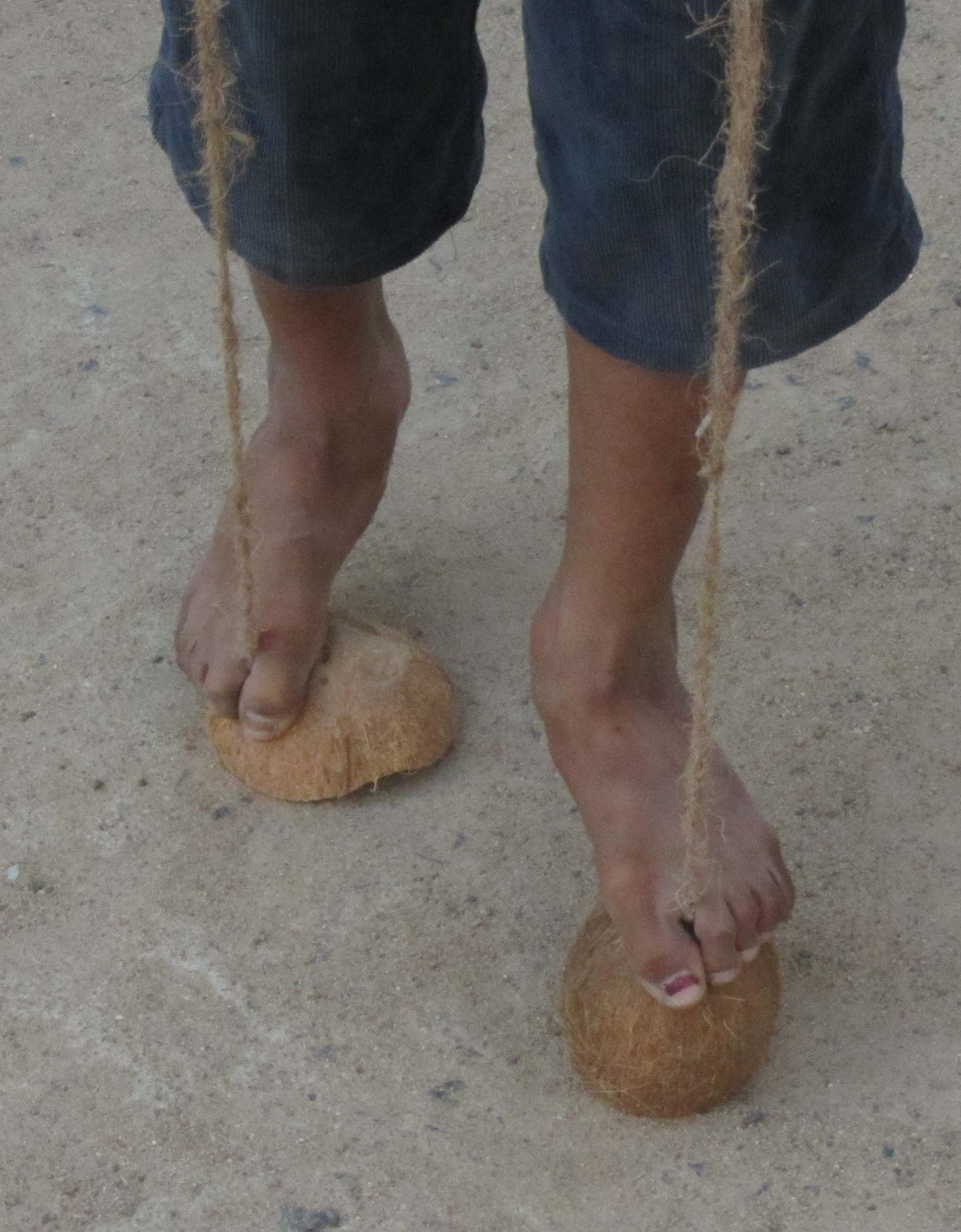 பொய்க்கால் நடை சிறுவர் விளையாட்டு. கொட்டாங்குச்சிக் காலில் நடத்தல். எனது படம்.